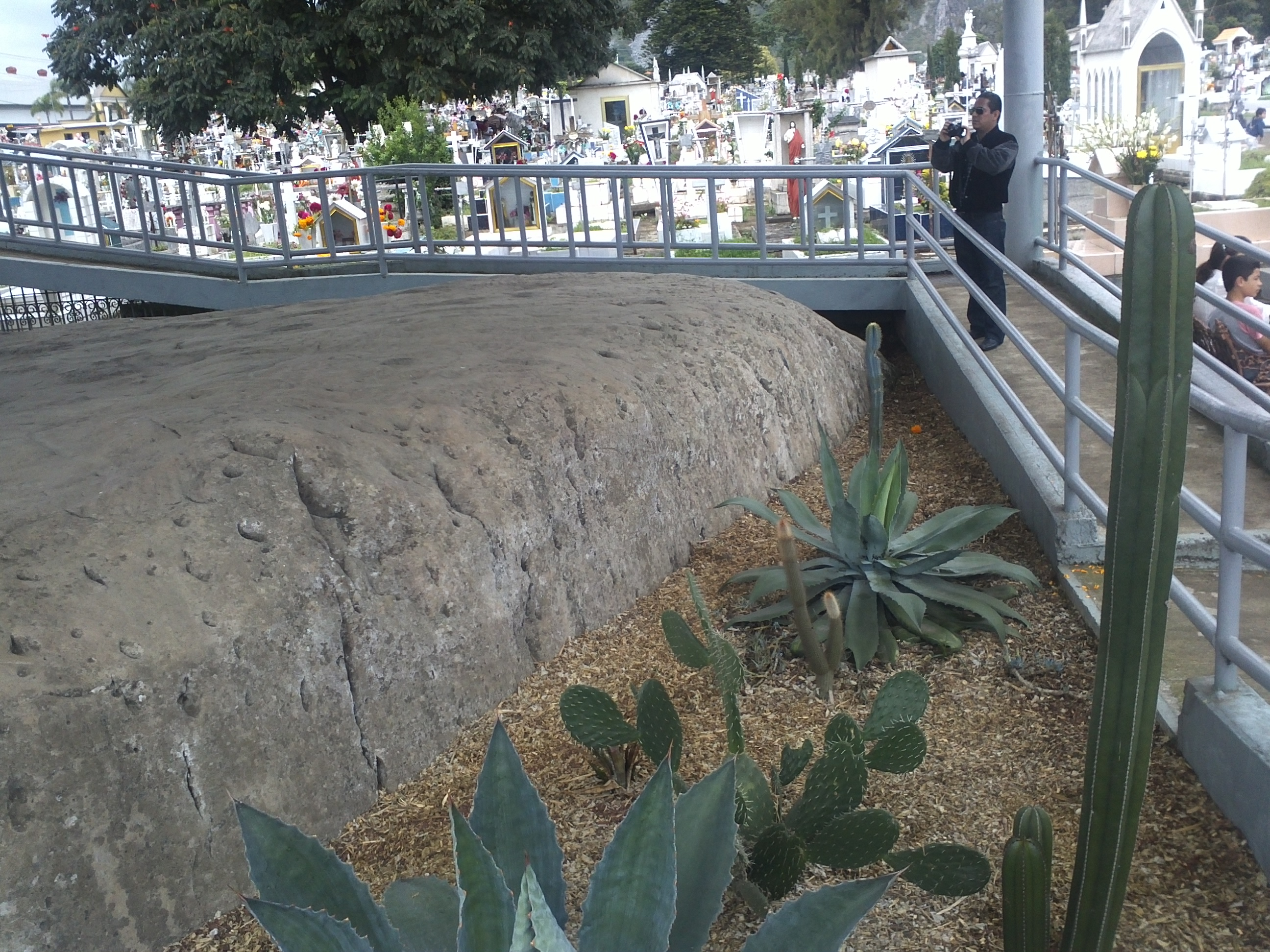 Piedra del Gigante en el panteón de Orizaba